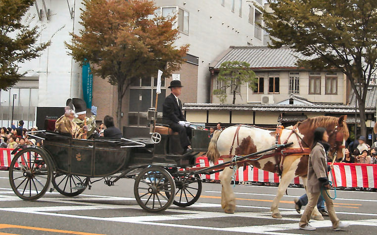 JIdai Matsuri Bugyo